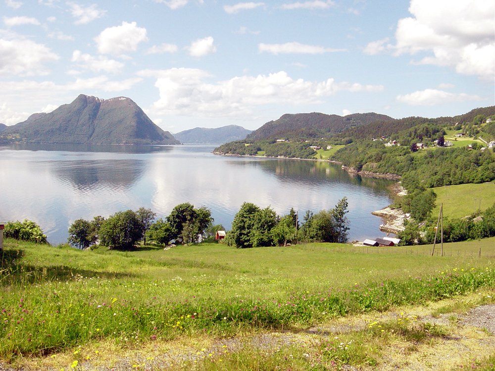 Ørskog and the Storfjorden på Sunnmøre